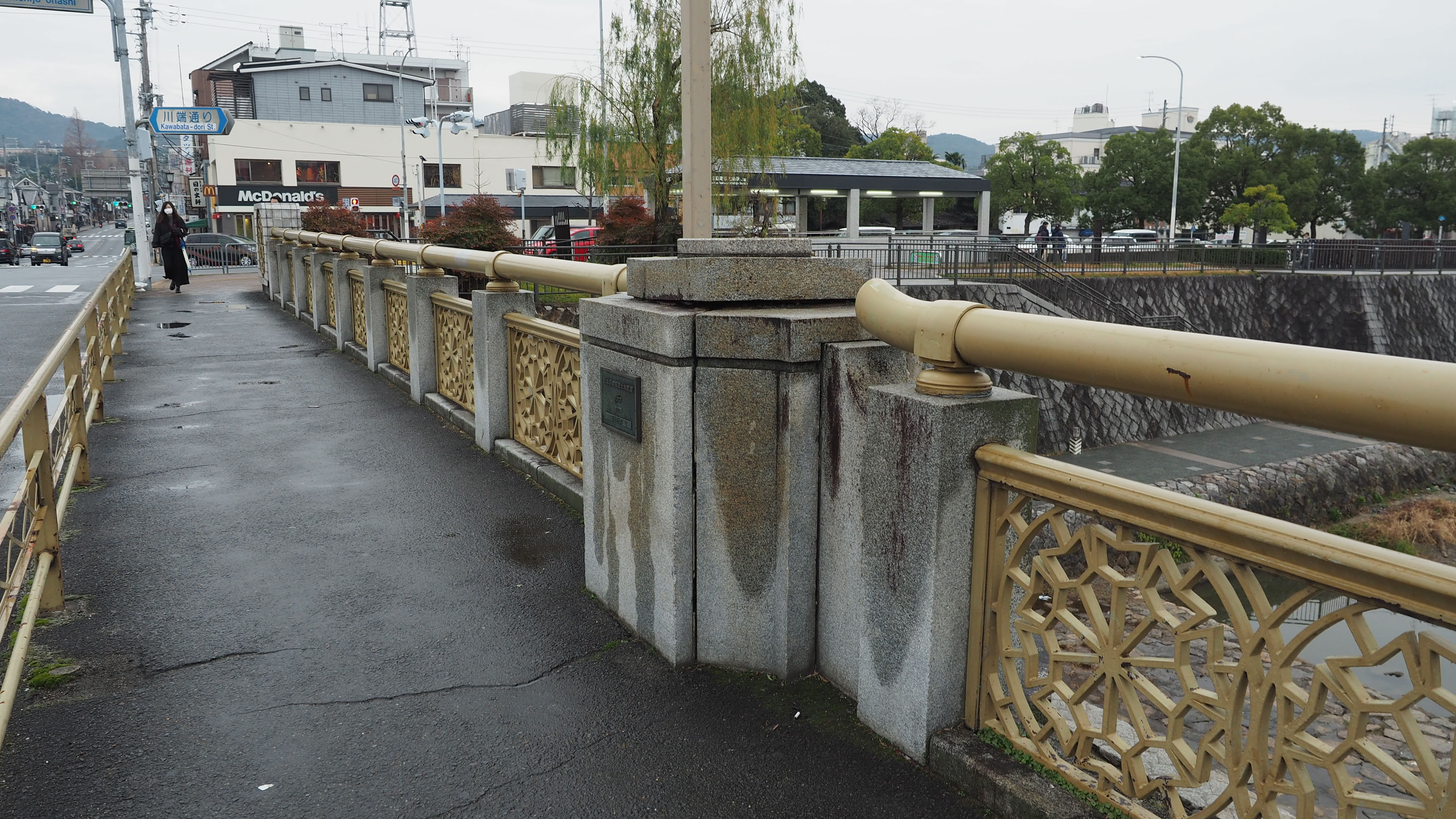 七条大橋の高欄。